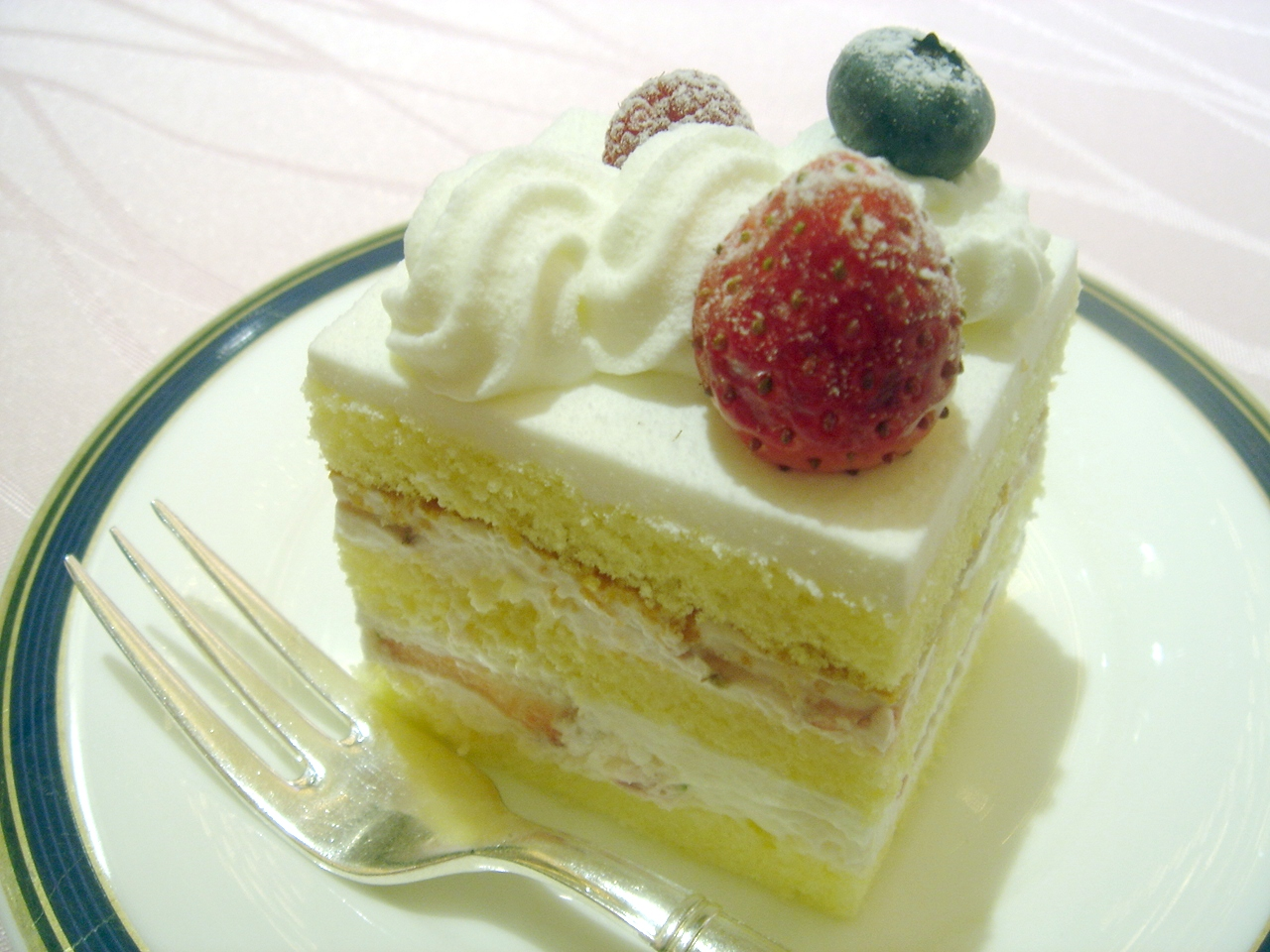 Wedding cake.